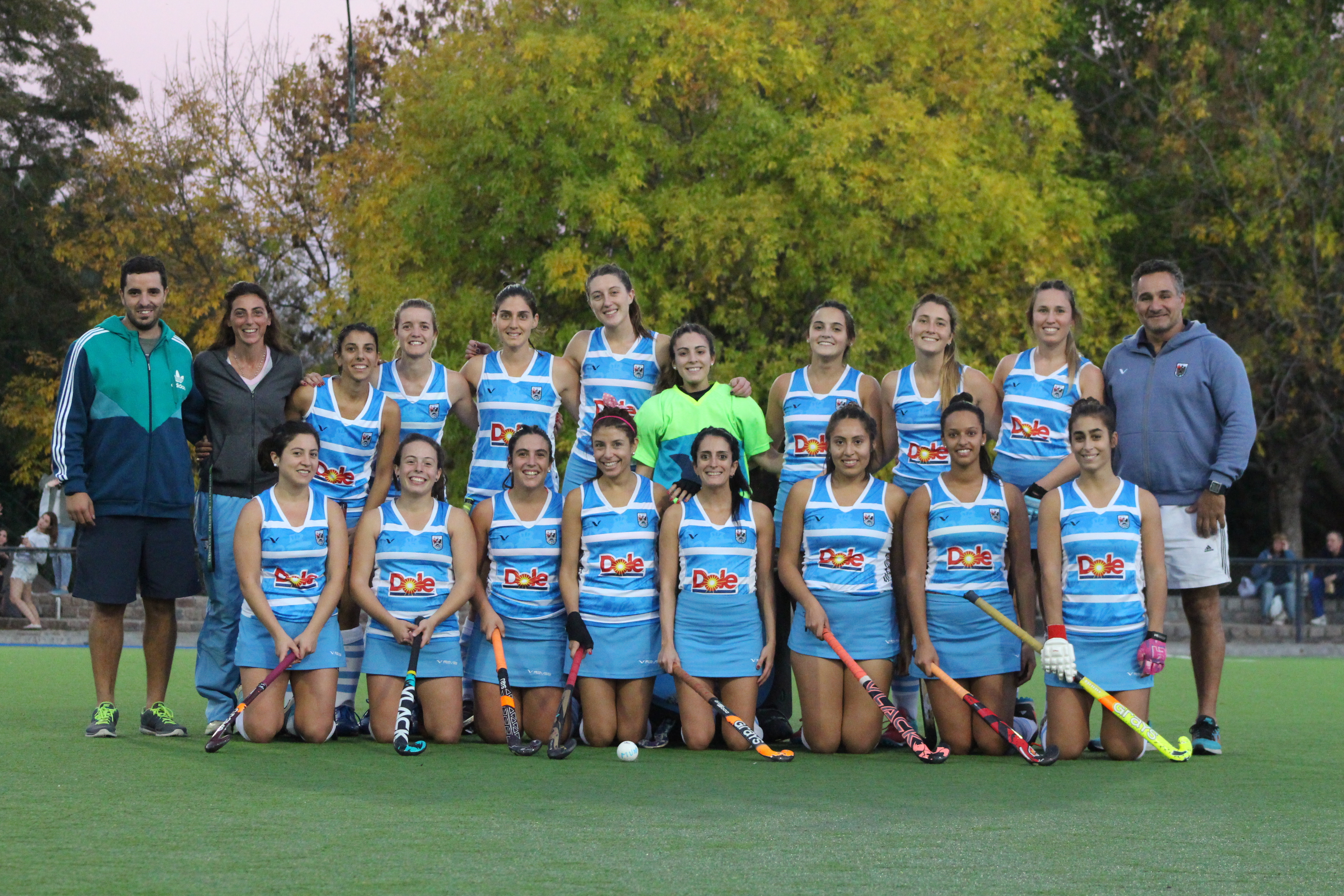 Ciudad D 2017